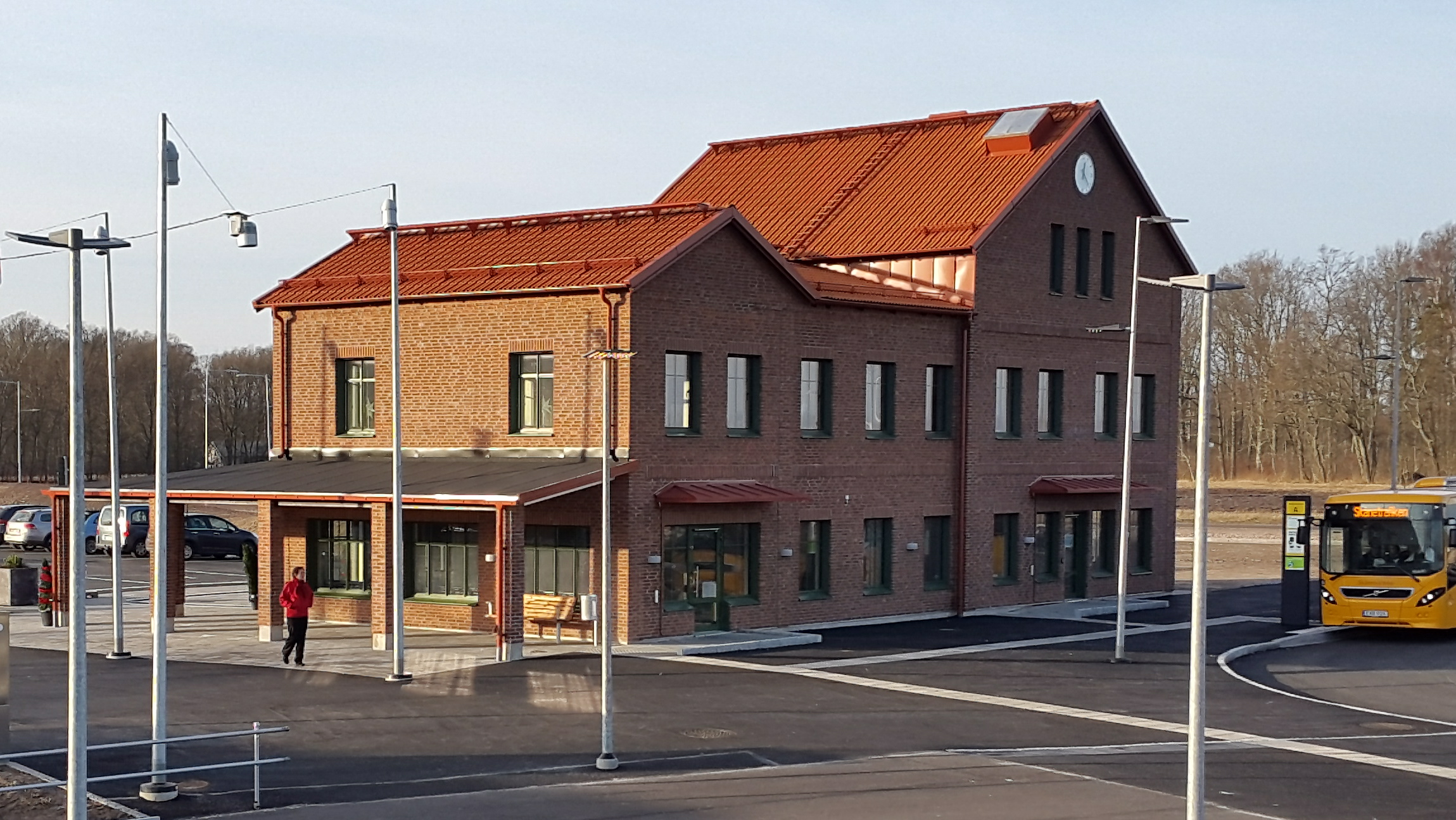 Båstads station, invigd hösten 2015.